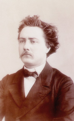 Eugène Vermersch (1845-1878)